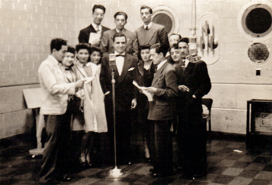 Audición de radioteatro en Radio Cooperativa 1944, Juan Matus a la derecha de la foto.